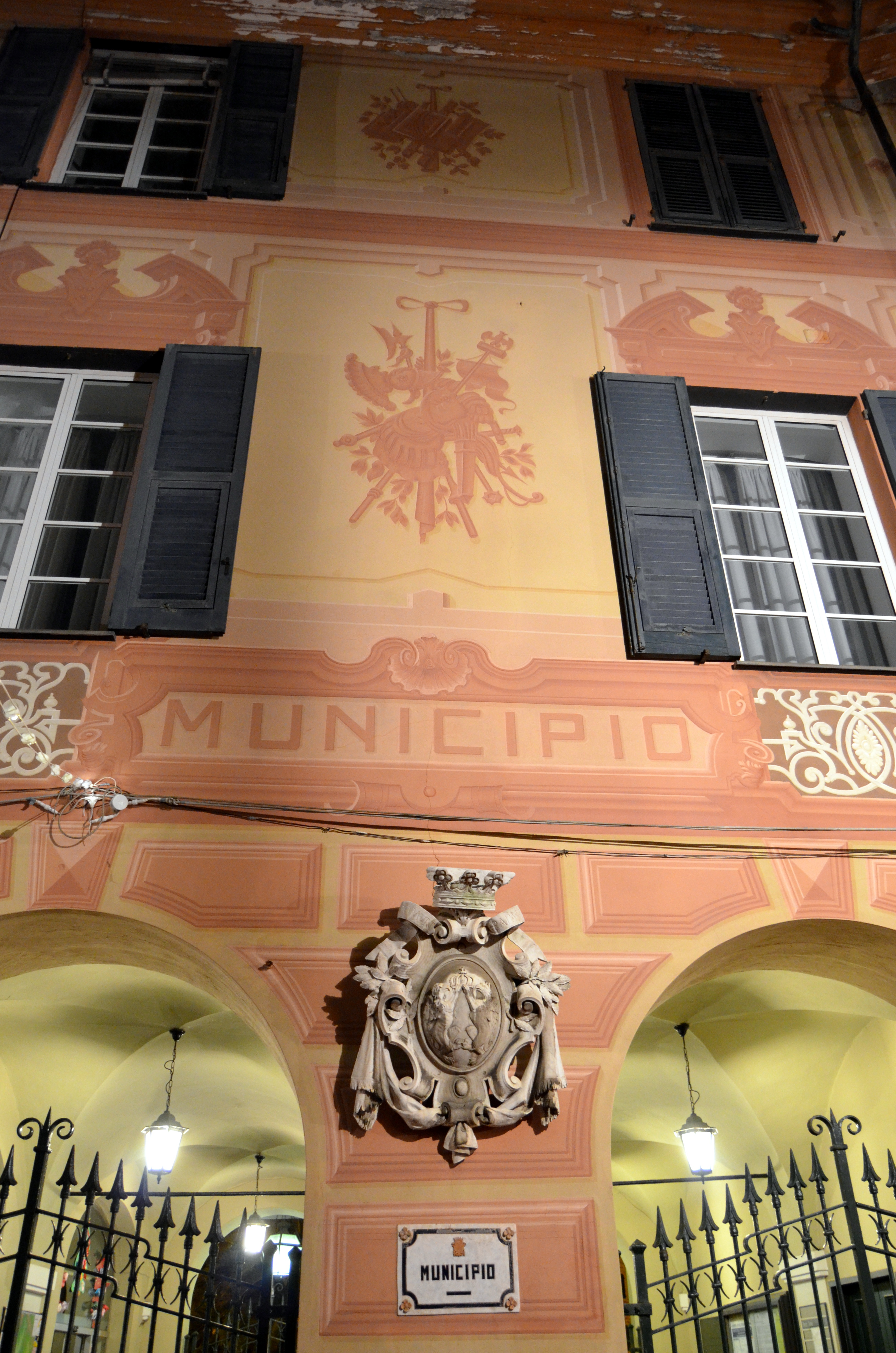 Dettaglio del palazzo municipale di Rapallo, Liguria, Italia